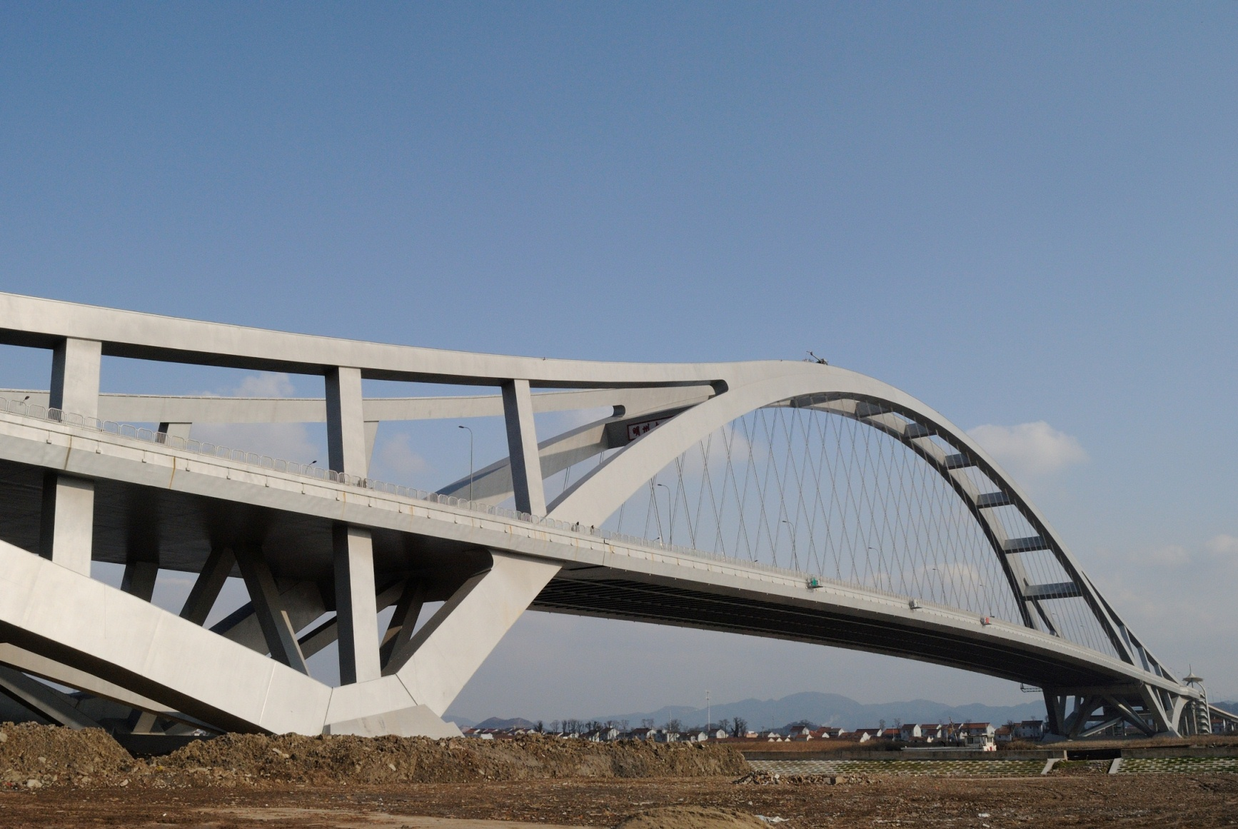 宁波明州大桥